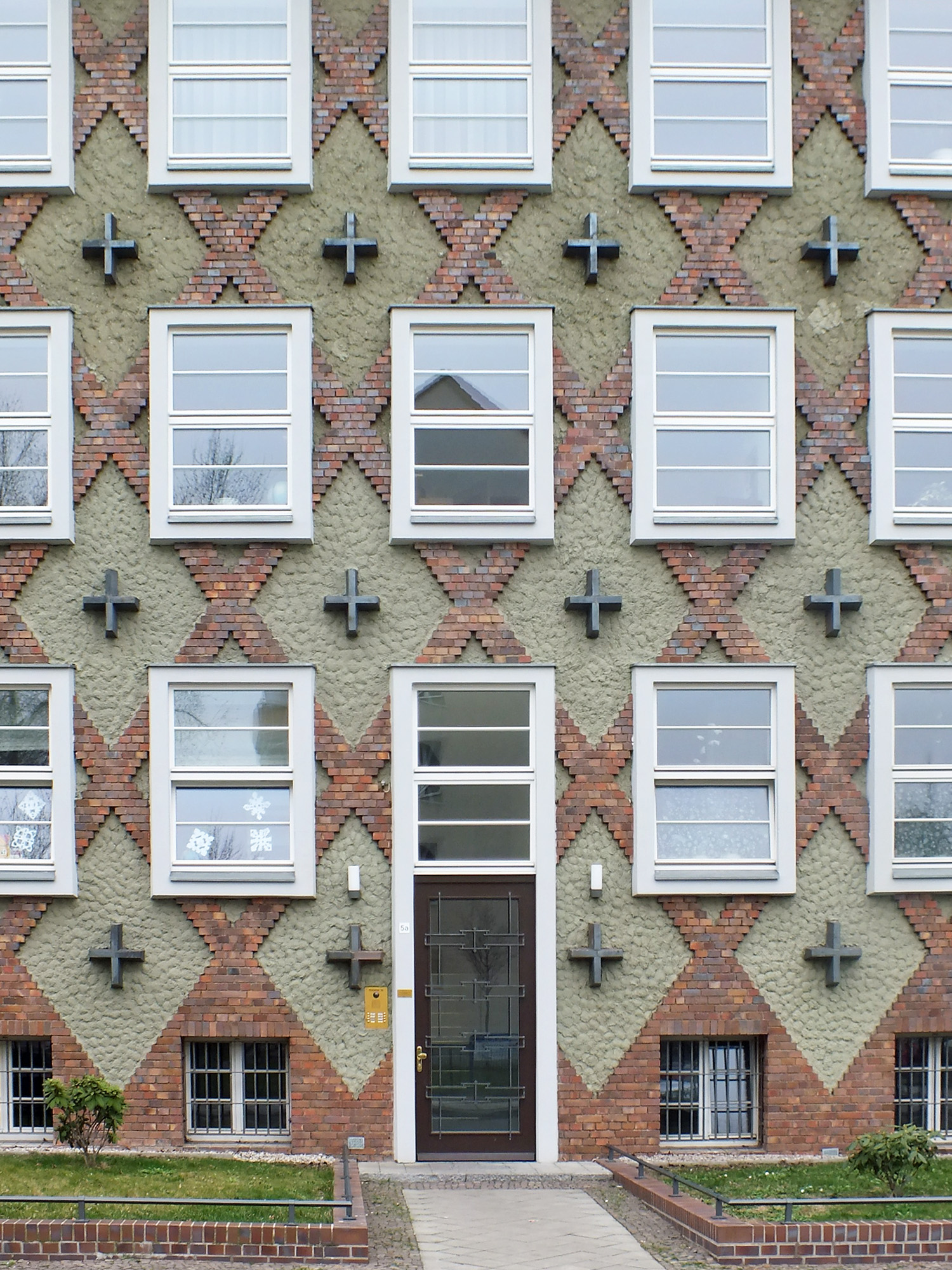 Teil der Fassade des ehemaligen Funkhauses Springerstraße in Leipzig